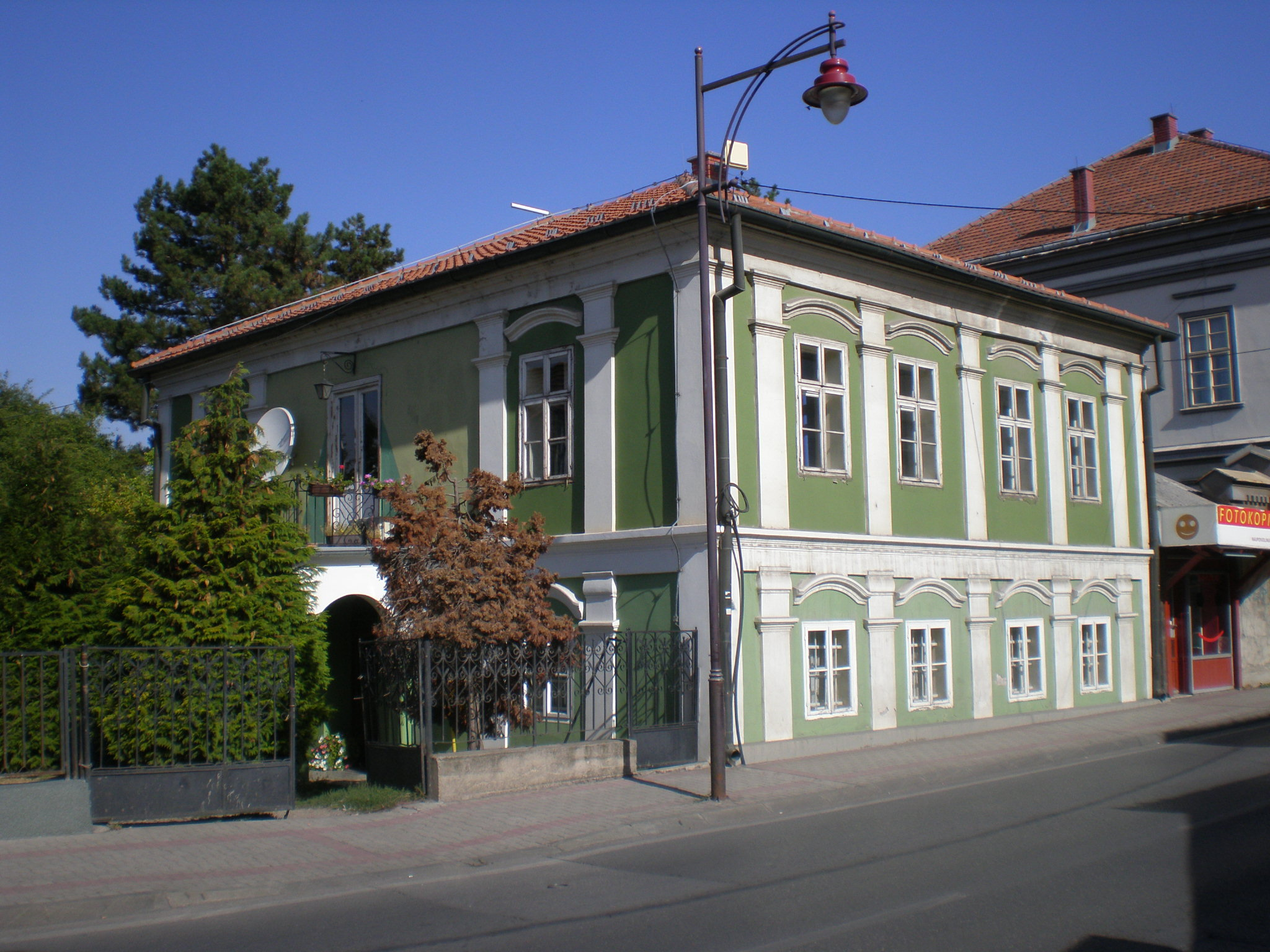 Зграда читаонице Градске библиотеке "Владислав Петковић Дис" у Чачку.